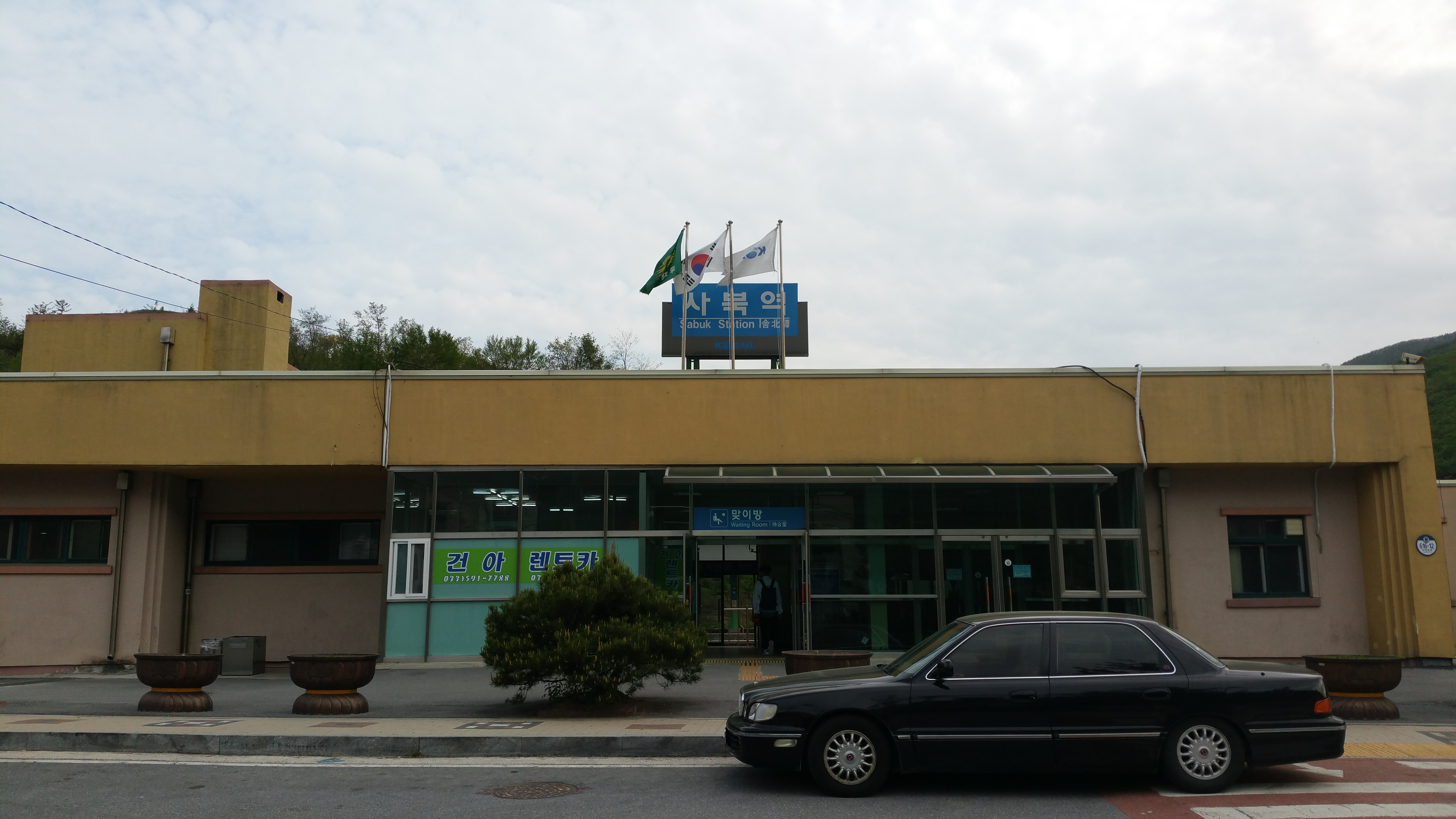 2016년 5월 9일에 촬영된 사북역 정면 모습.